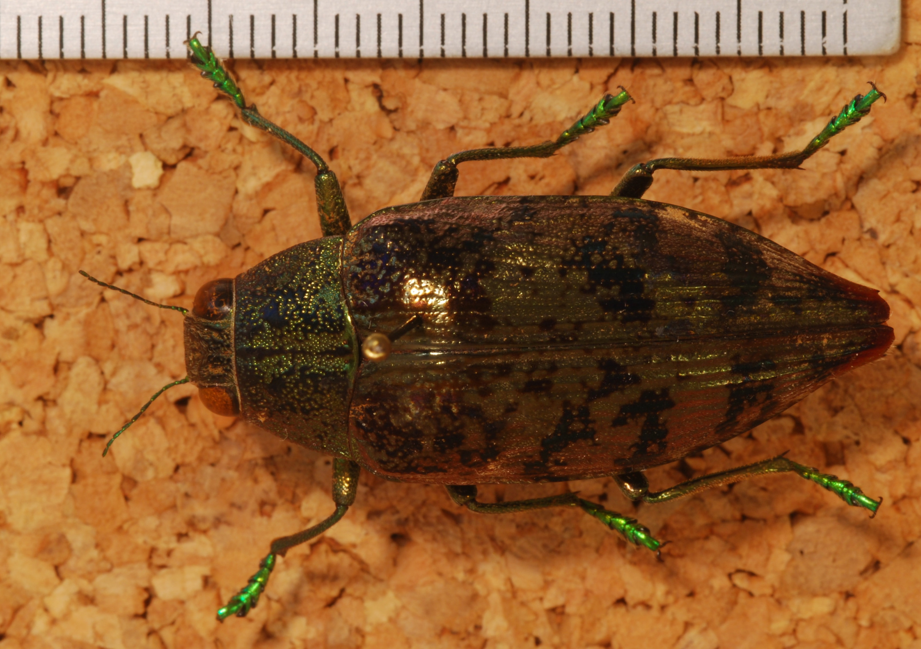 Beparasy, MADAGASCAR